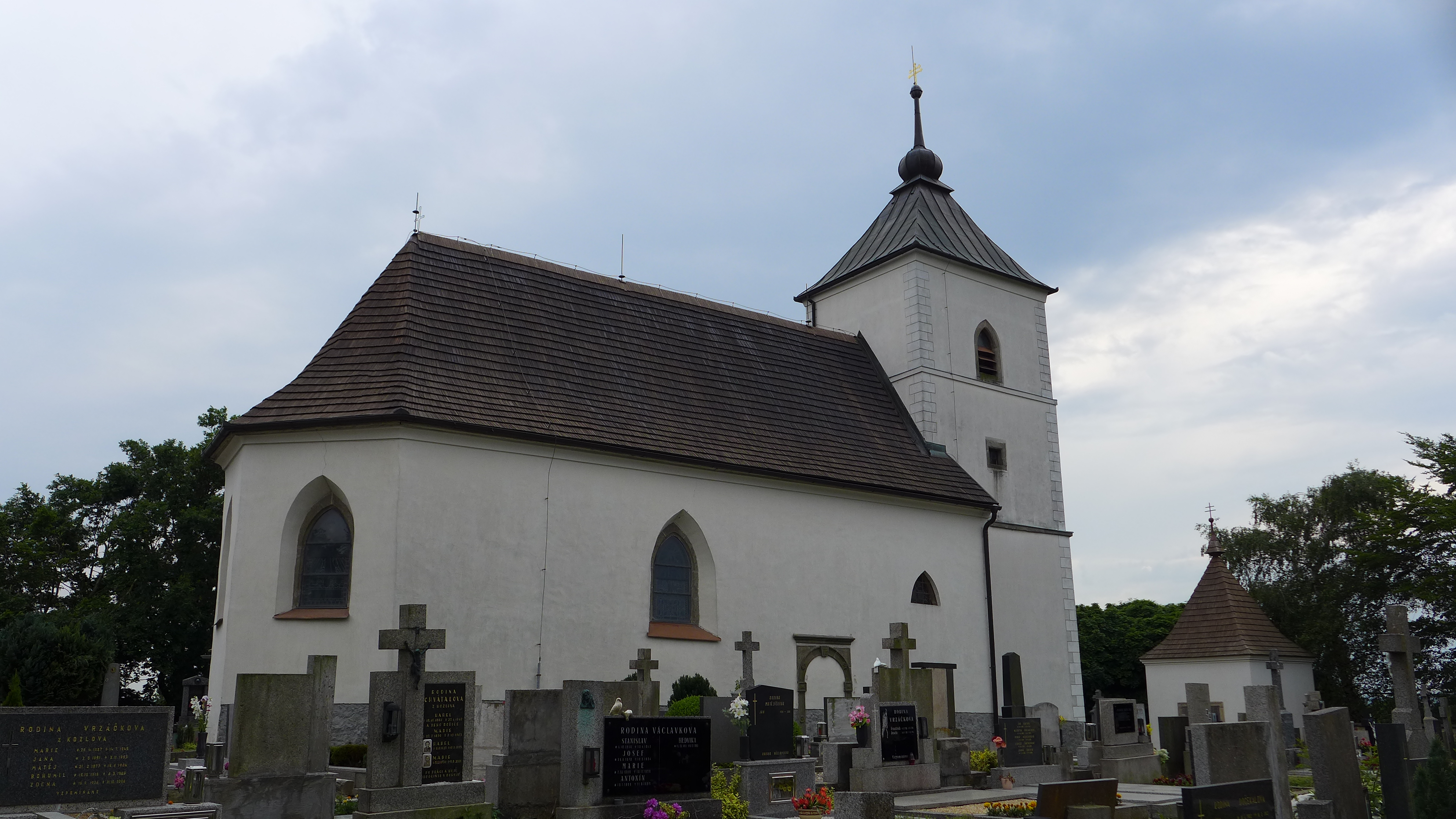 Kostel Nejsvětější Trojice, Vysoké Studnice.